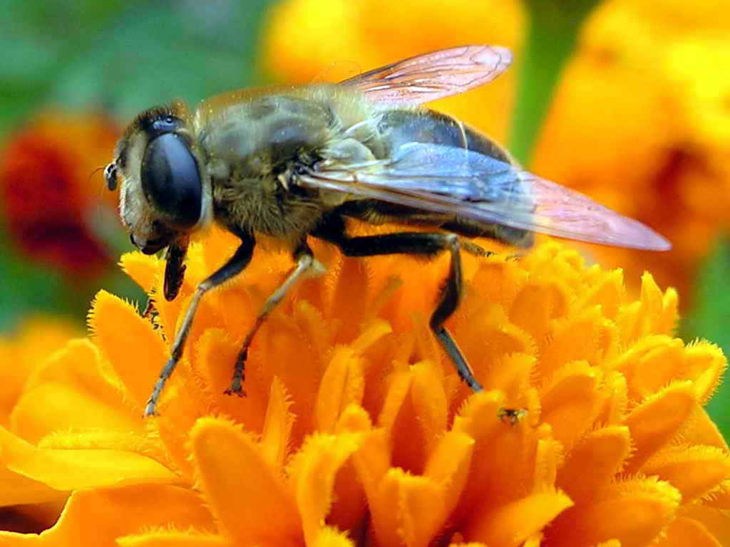 Foto tirada cunha Nikon E8800. Self made Bastabales - Galicia - Spain